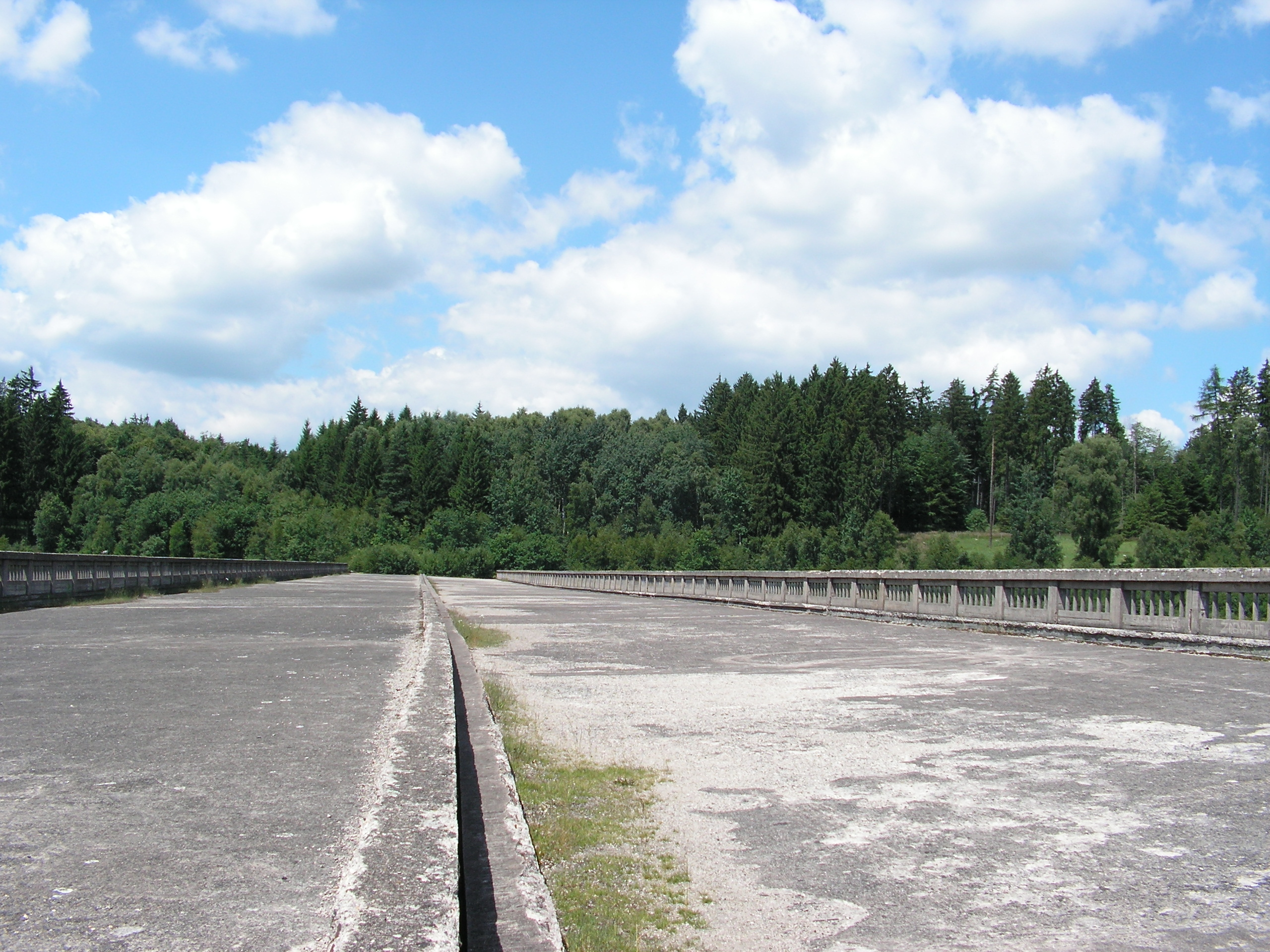 Starý nedokončený dálniční most přes zatopené údolí Sedlického potoka u Borovska.